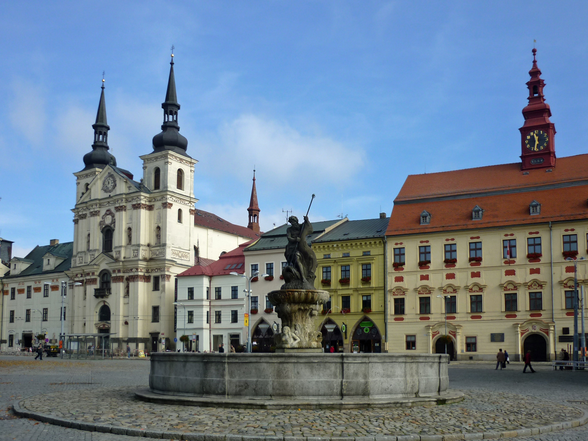 St. Ignatiuskirche und Rathaus der Stadt Iglau (Jihlava)